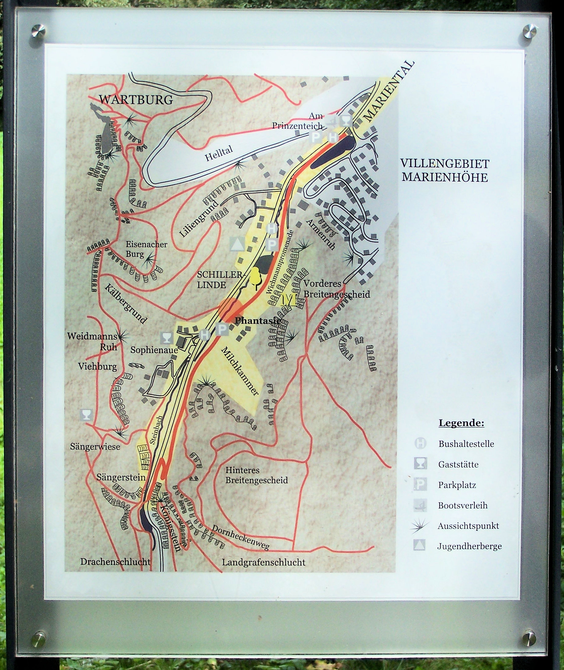 Eine Übersichtskarte erläutert die Lage der Hauptsehenswürdigkeiten im Mariental in der Eisenacher Südstadt.